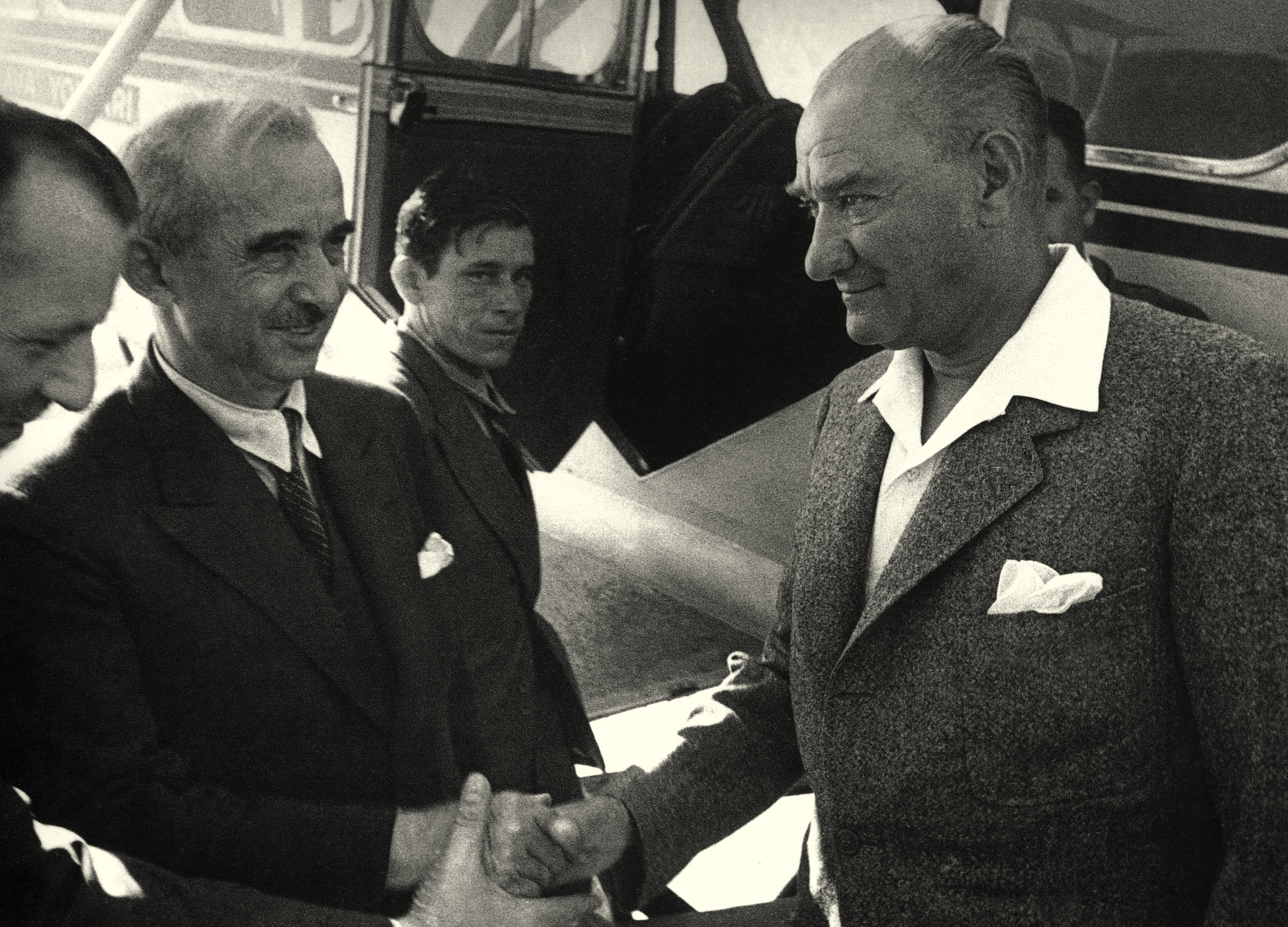 Cumhurbaşkanı Mustafa Kemal Atatürk ve başbakan İsmet İnönü 16 Haziran 1936 günü uçağın kapısında tokalaşırken